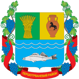 Герб Першотравневого району